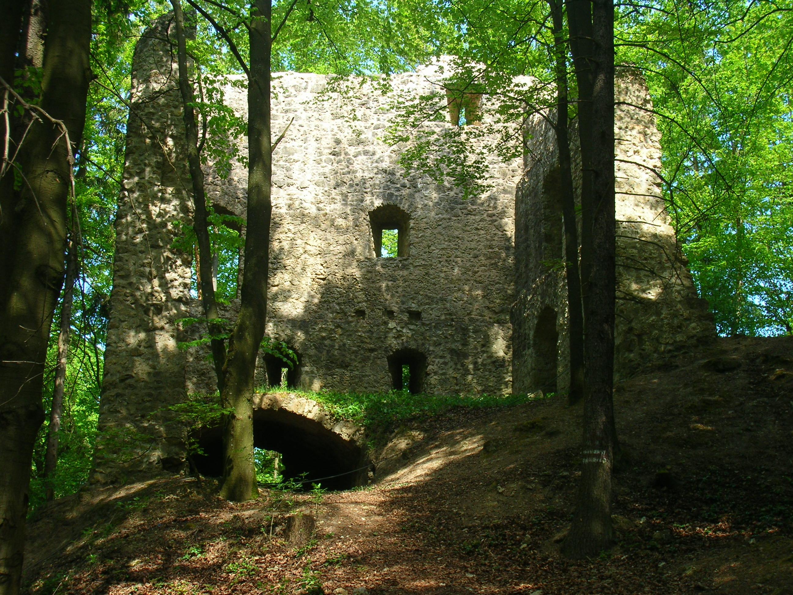 Der Wohnturm der Burgruine Roßstein von Südwesten